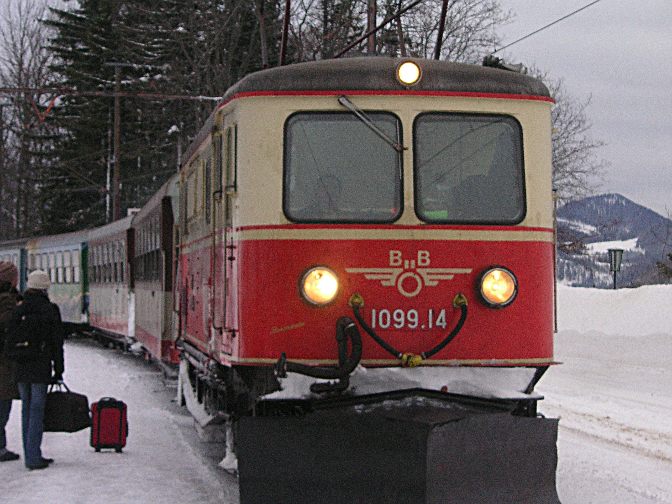 de: ÖBB 1099.14 in Gösing an der Mariazellerbahn en: ÖBB 1099.14 in Gösing an der Mariazellerbahn, Lower Austria